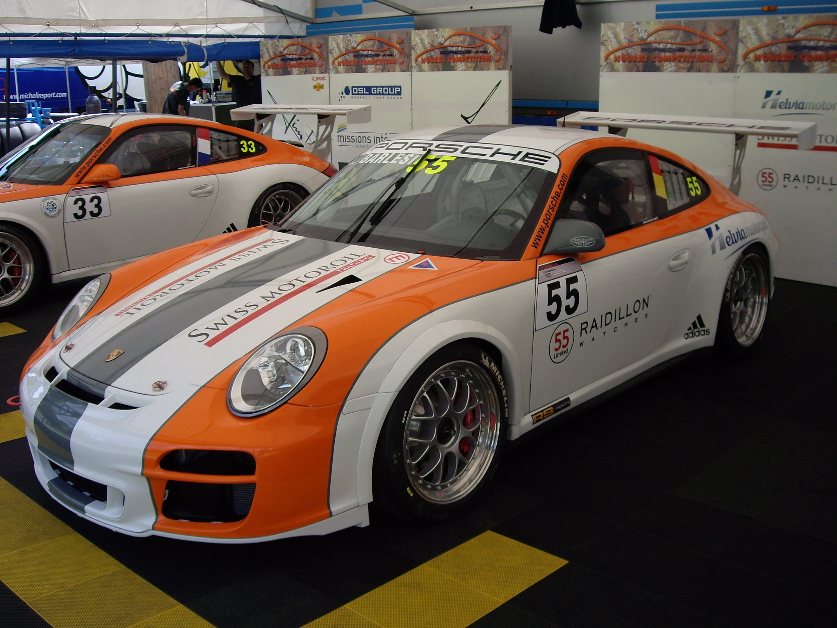 Porsche 997 GT3 de course automobile pilotée par Andrea Barlesi